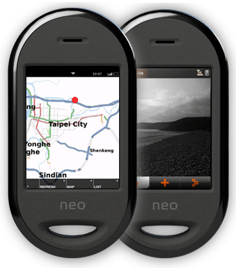 Openmoko Neo Freerunner (GTA02) telephone